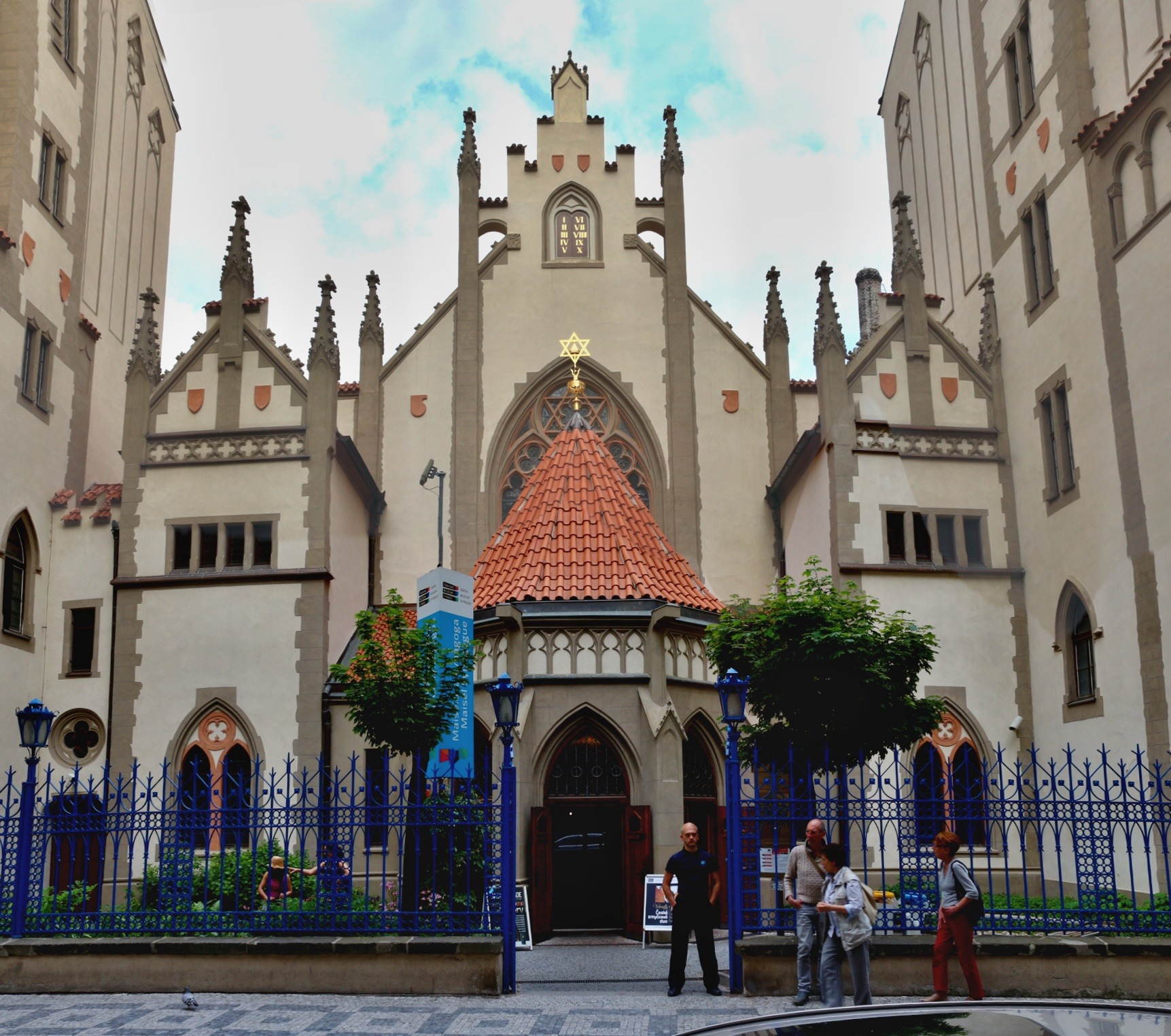 Maiselova synagoga